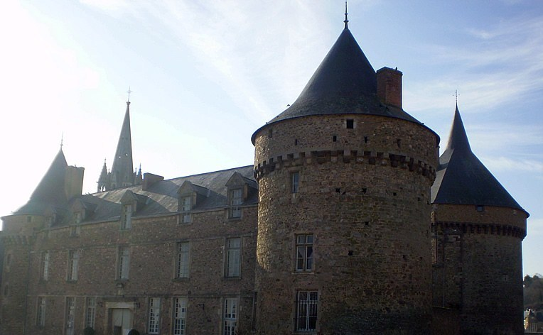 Photo du château de Sillé-le-Guillaume, commune de la Sarthe.